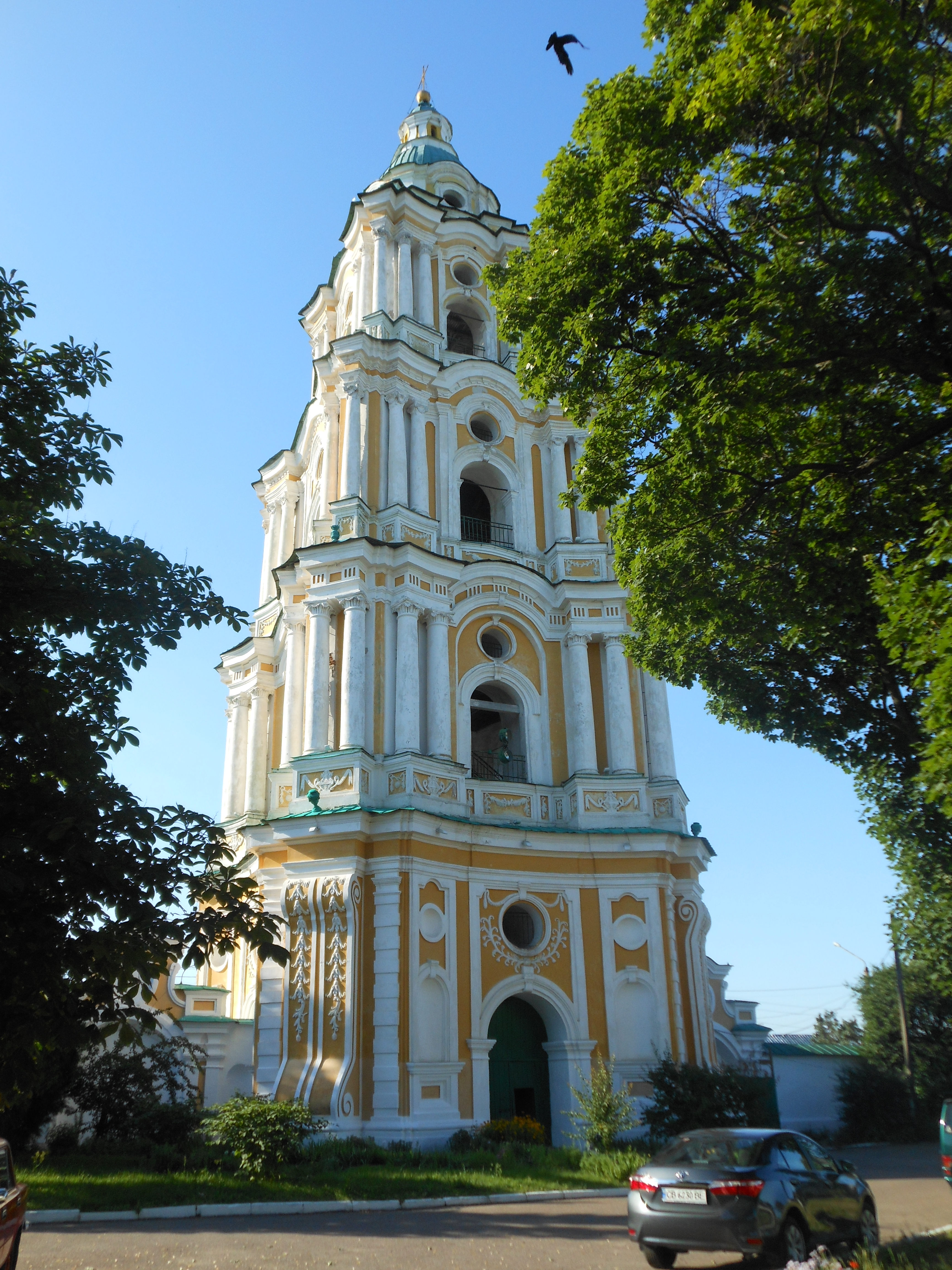 Дзвіниця Троїцького собору, Чернігів, вул.Толстого, 92-Е